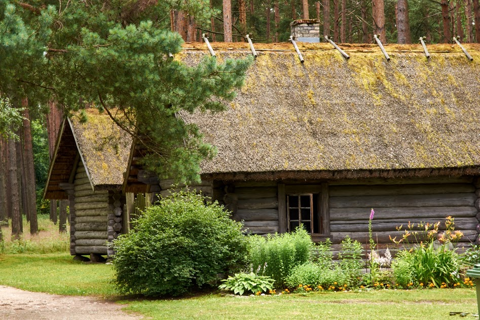 Latvijas etnogrāfiskais brīvdabas muzejs celtņu komplekss, Rīga, Brīvības iela 440